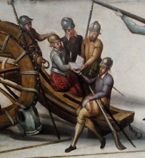 Détail de